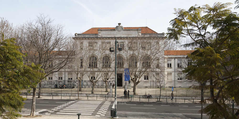 Liceu Camões (Escola Secundária Camões), Lisboa; Arq. Ventura Terra